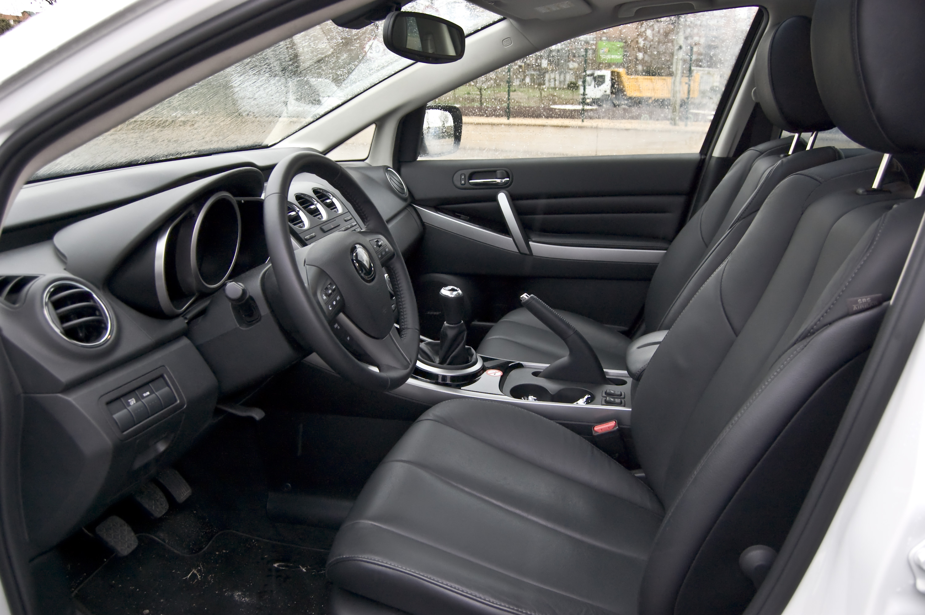 Prueba del Mazda CX-7 para Diariomotor